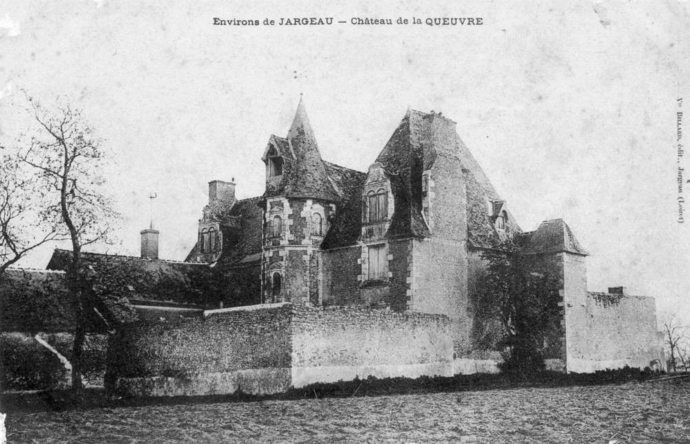 Château de La Queuvre, Férolles, Loiret, Centre, France